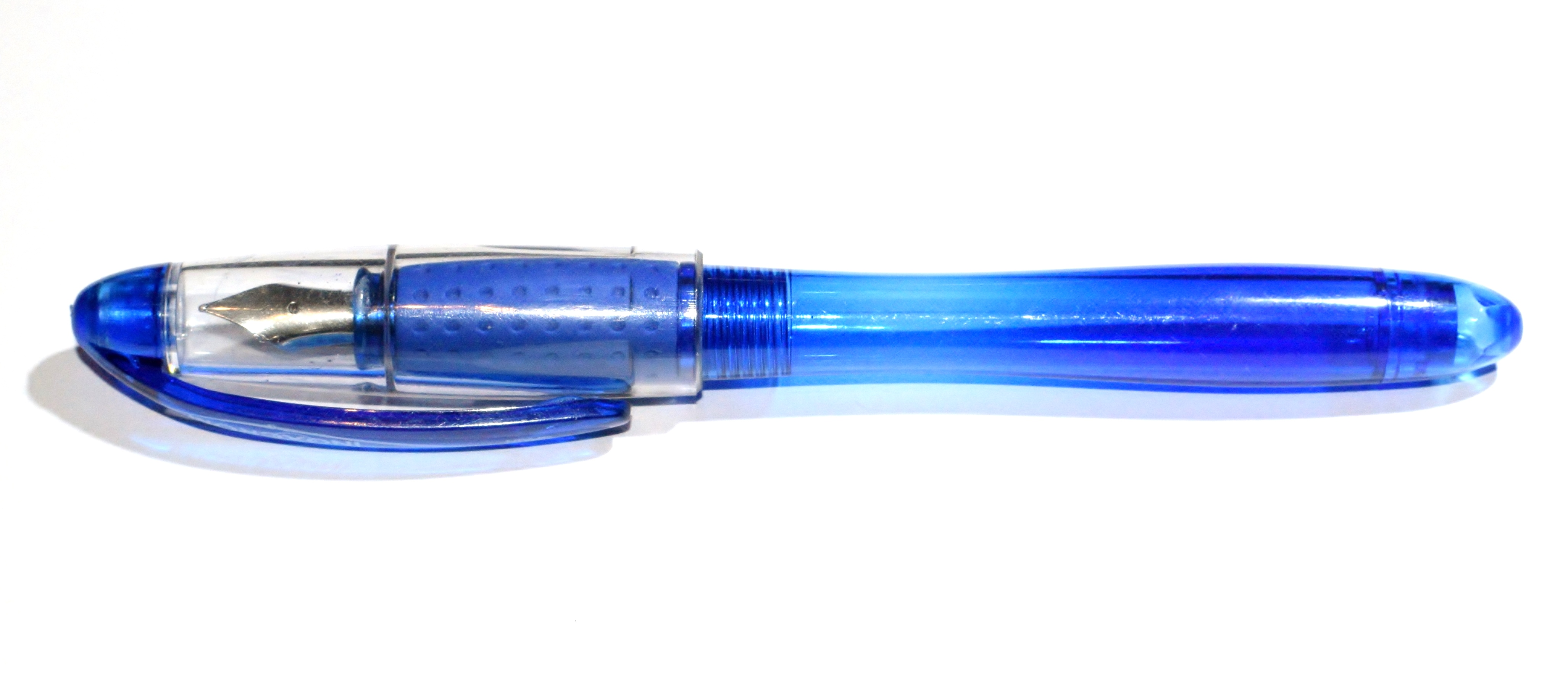 Inoxgroup Curvy